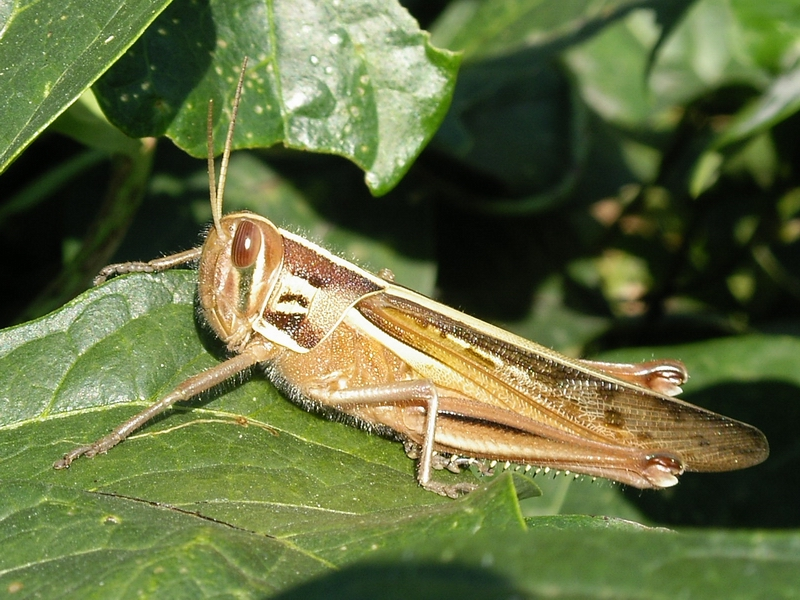 Patanga japonica(ツチイナゴ)